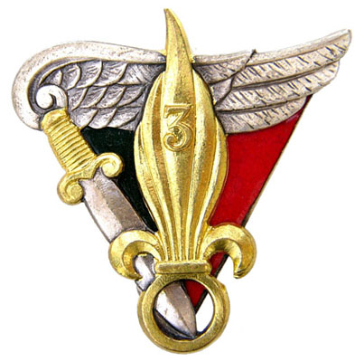 insigne du 3e BEP puis du 3e REP